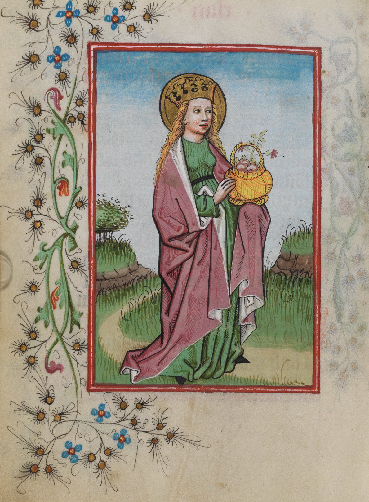 Illuminierte Seite aus dem Waldburg-Gebetbuch, WLB Stuttgart, Cod. brev. 12, fol. 45v